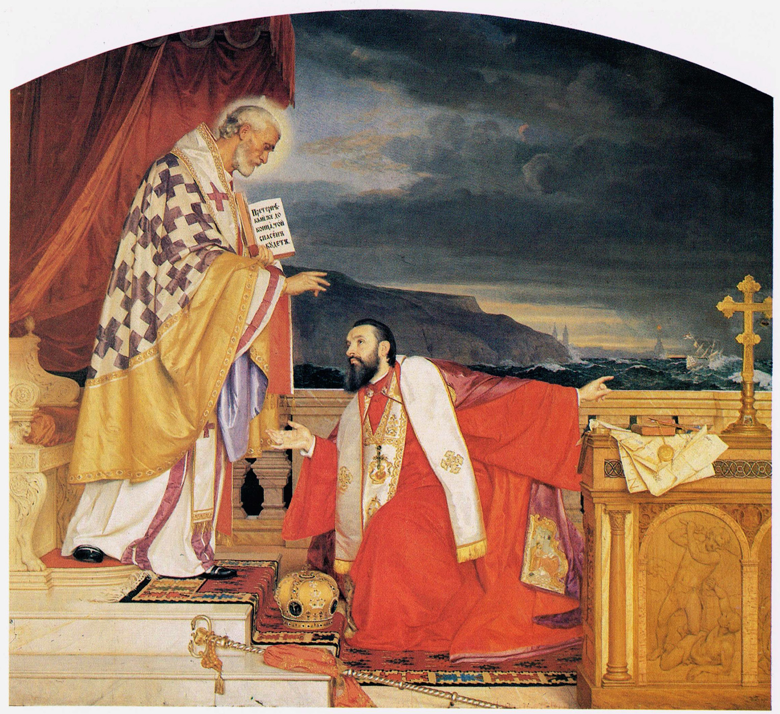 St. Nikola and Patriarch Lukijan, 1910